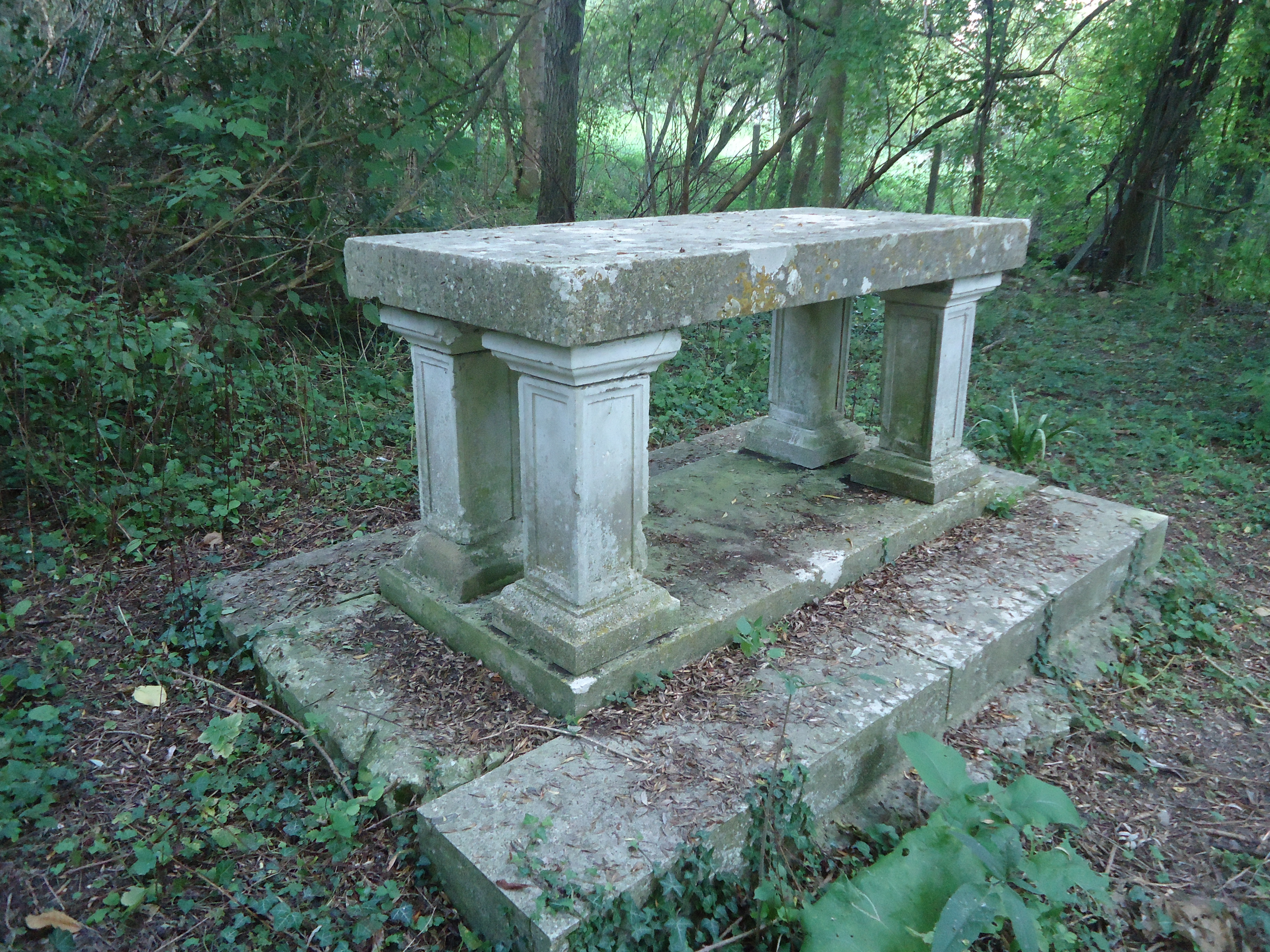 Tombeau de Saint-Ethbin - Port-Mort - Eure (27)